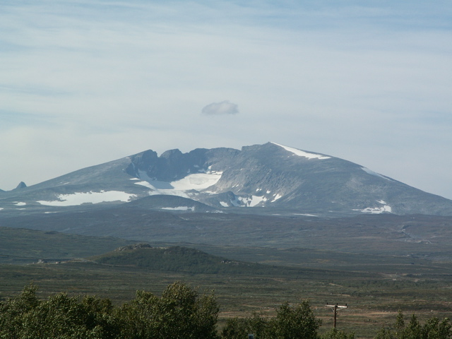 Der Snoehetta, ein Berg in Norwegen/ Dovre-Fjell, 2286m hoch.